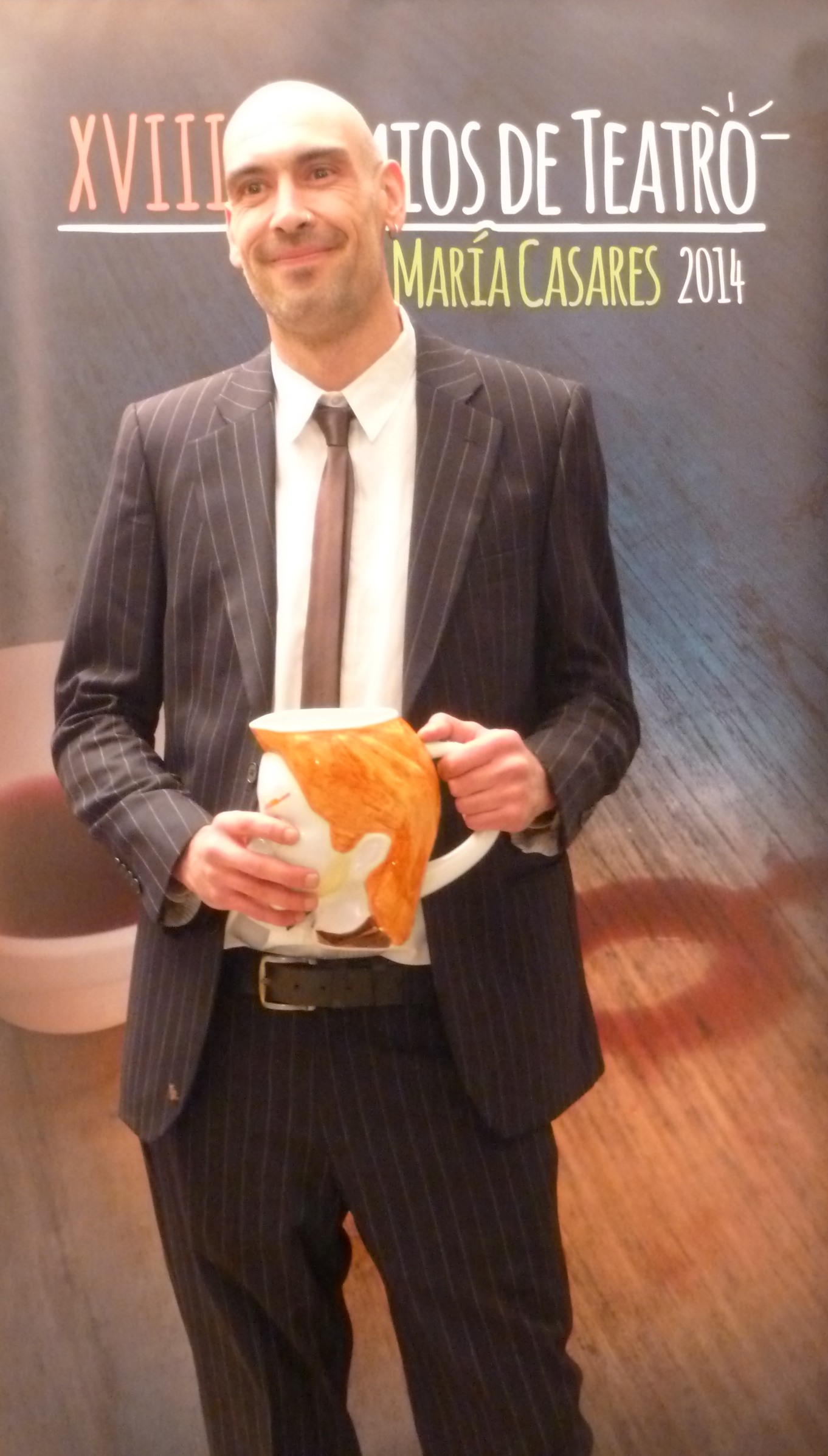 Fidel Vázquez na gala dos premios María Casares 2014.